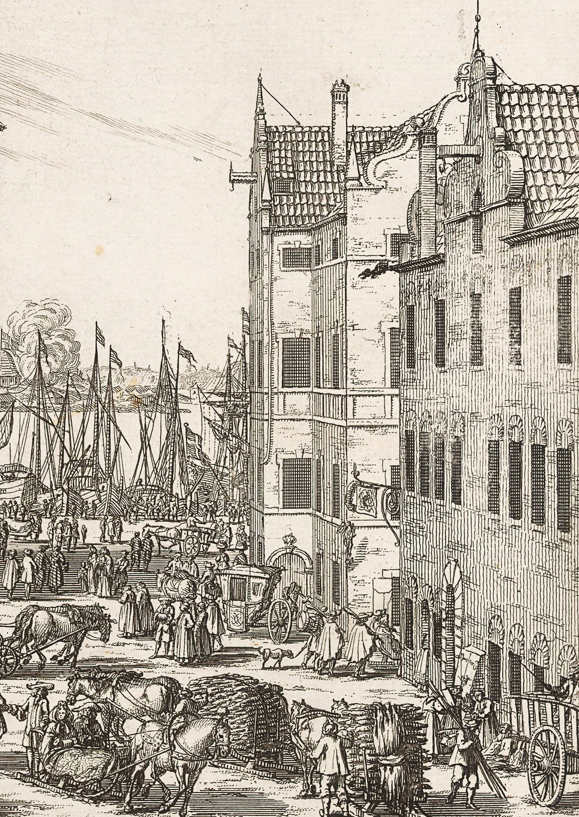 Järntorget med krogen Blå Örns flaggskylt